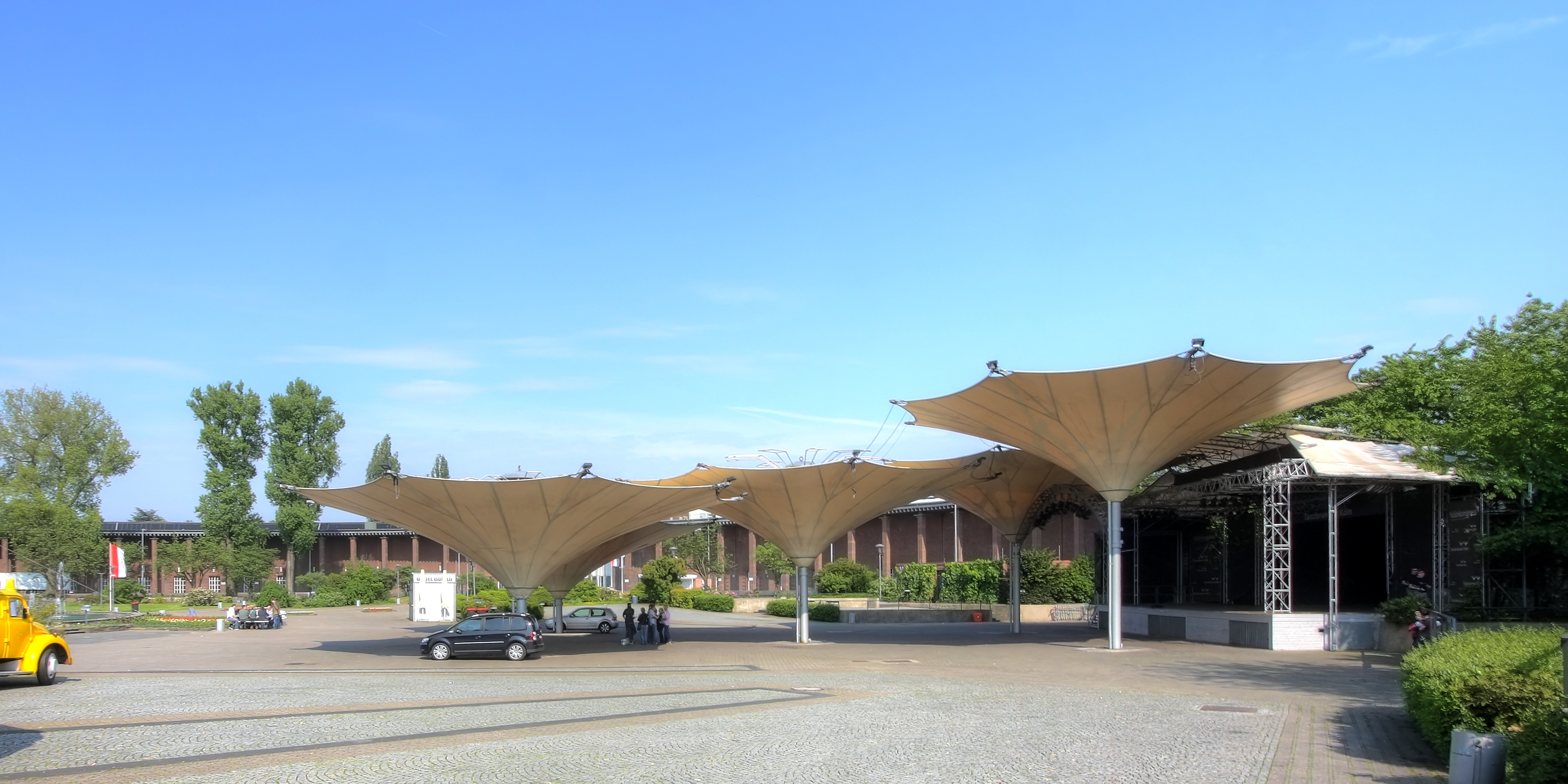 Open-Air-Bühne am Tanzbrunnen Köln, Teil vom Rheinpark. Überdachung: Frei Otto. This is a photograph of an architectural monument.